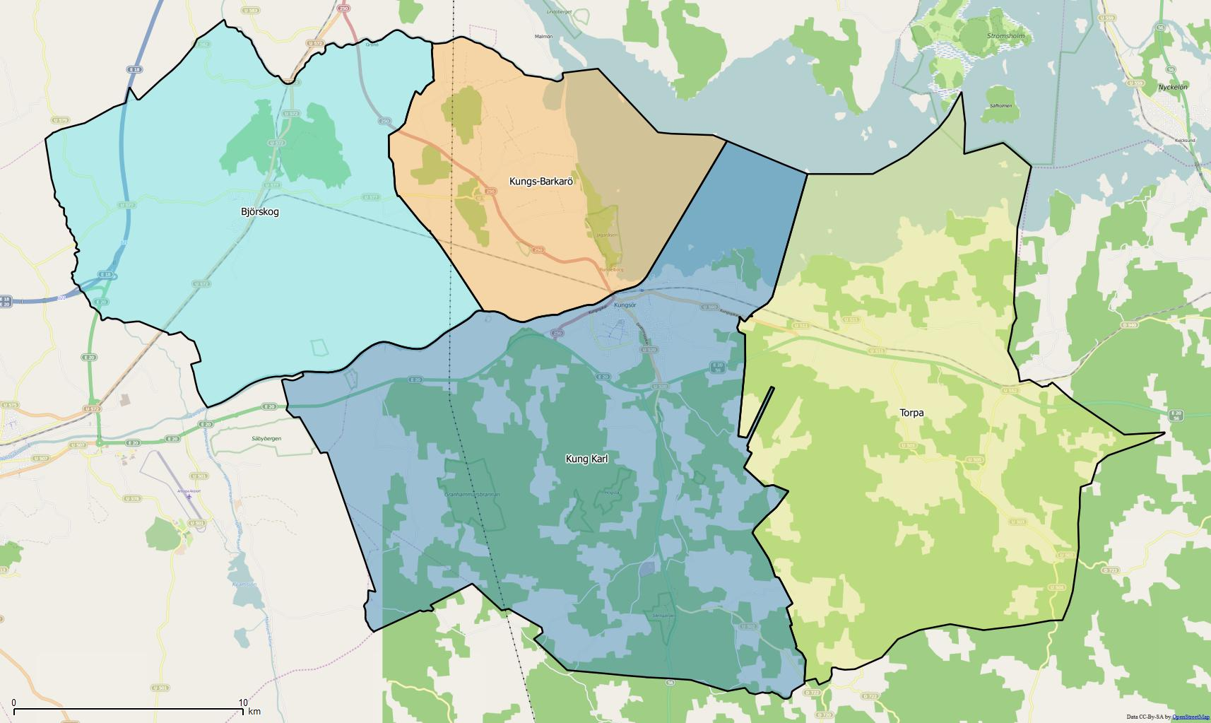 Distriktsindelningen i Kungsörs kommun World file: 30.83046611274828308 0 0 -30.83046611274828308 1764429.13184983376413584 8286072.52864899672567844